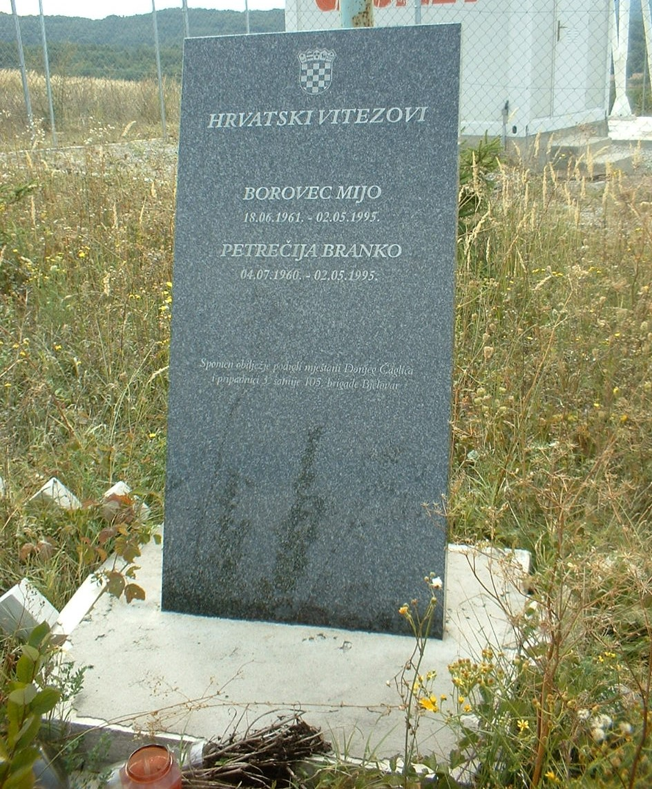 Placa conmemorativa de dos combatientes 105 brigada en Donji Čaglić muertos el 2 de mayo de 1995